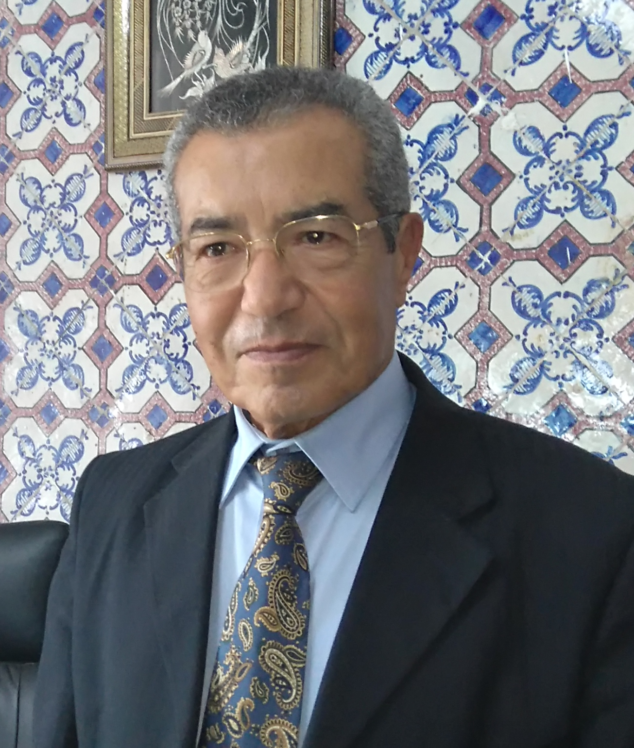 Abdelmajid Charfi derrière son bureau au Palais Zarrouk